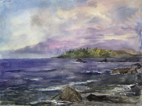 "Havsakvarell", målas 2008 av Markus Anderrsson